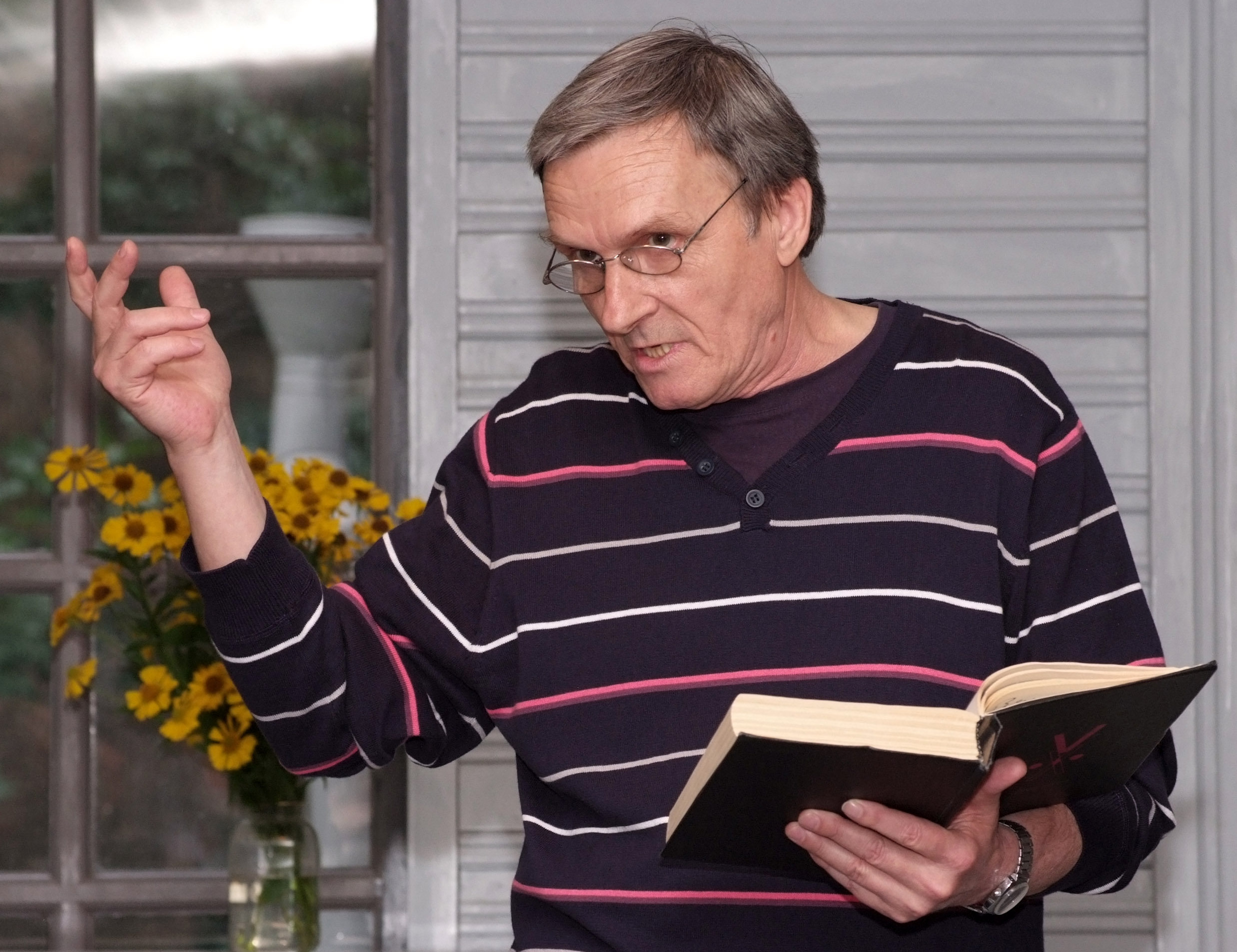 Сергей Евгеньевич Бирюков